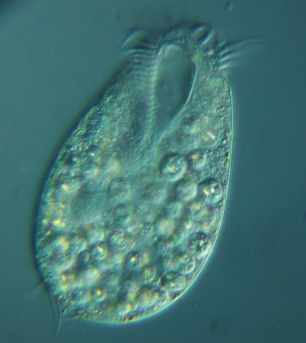 Oxytricha chlorelligera - 400x